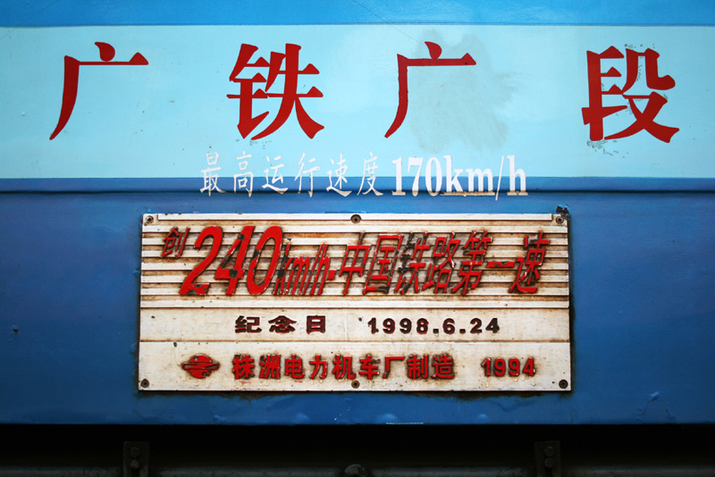 韶山8型电力机车曾创造“中国铁路第一速”的铭牌